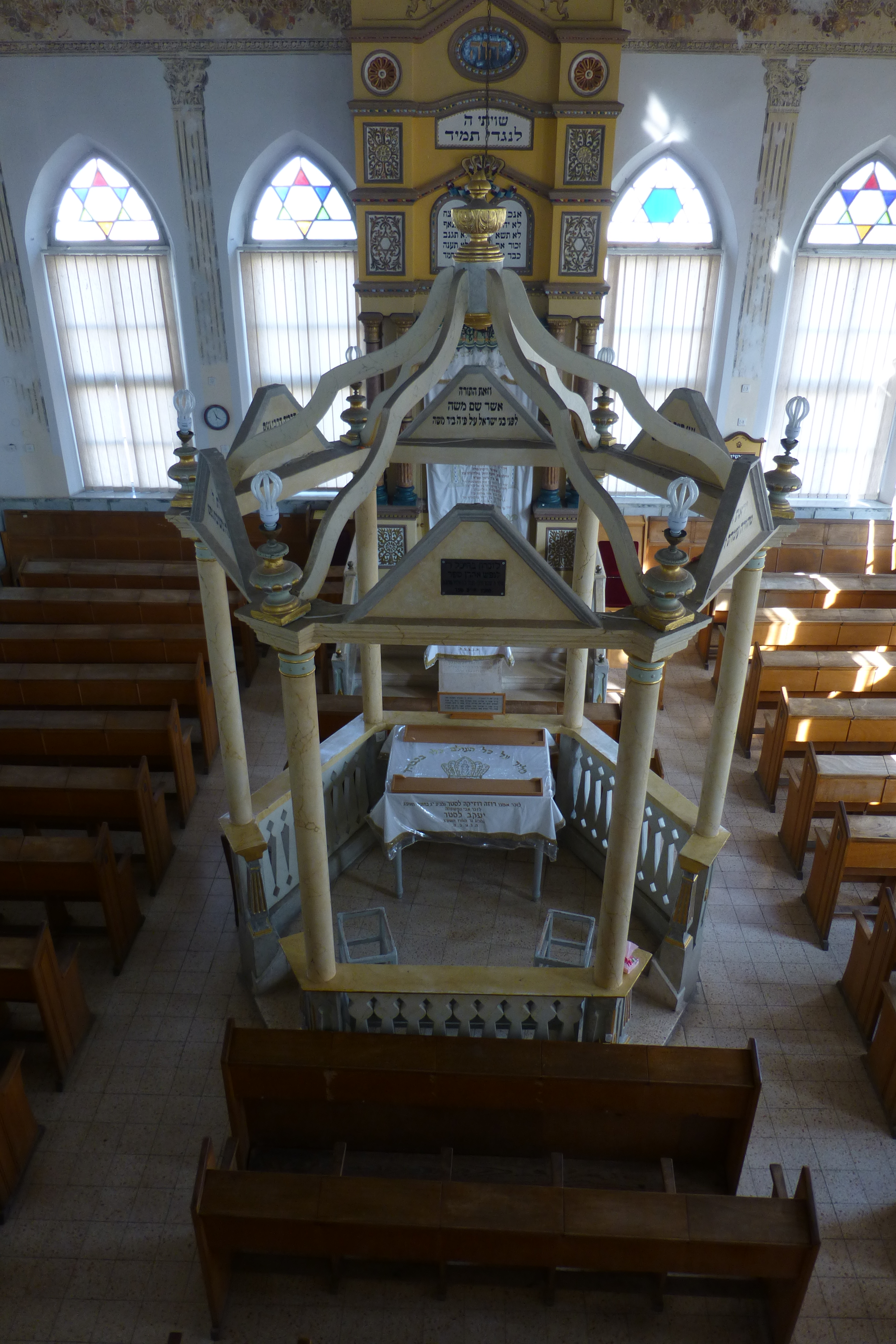 נוסד על ידי ראובן לרר ושימש בעבר כבית ספר, בית כנסת, בית ההגנה והיה המרכז הקהילתי הראשון למושבה נס ציונה. כיום משמש כמוזיאון בית ראשונים.